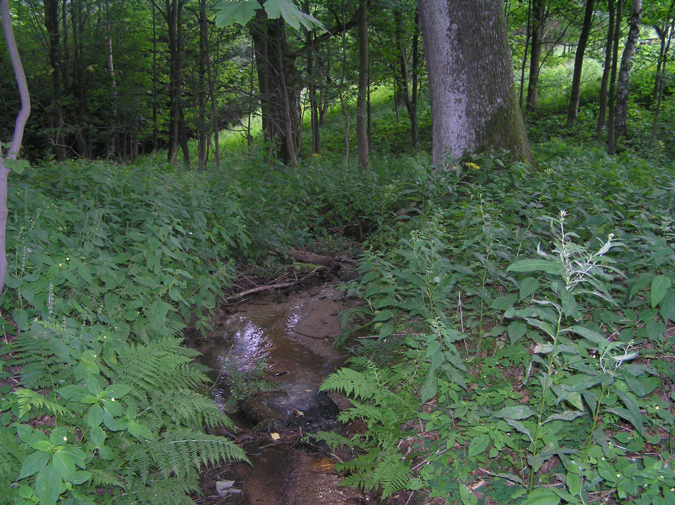 Heřmanický potok is the creek in the Králický Sněžník Mountains, Czech Republic